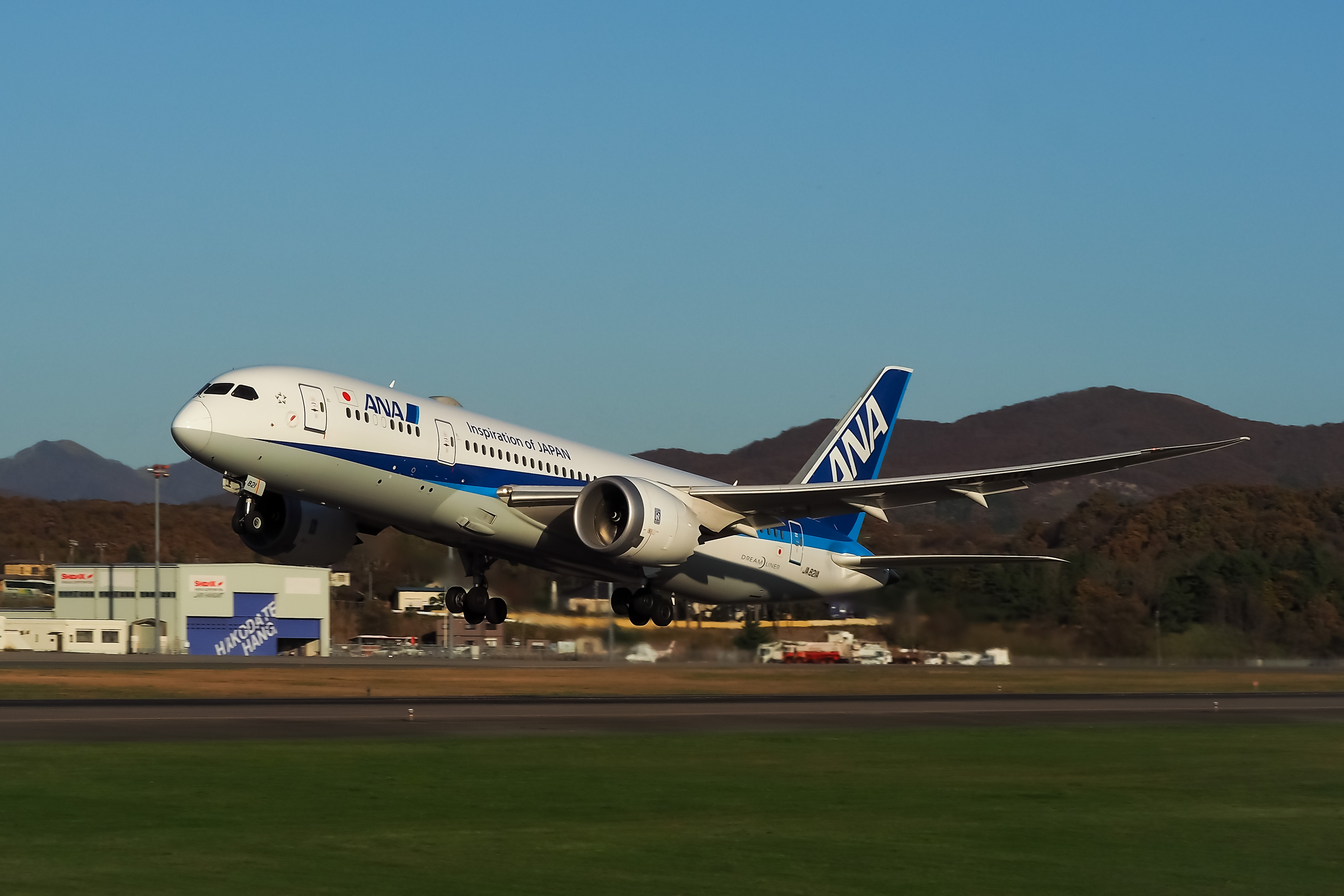 函館空港を離陸する、全日本空輸のB787-8。